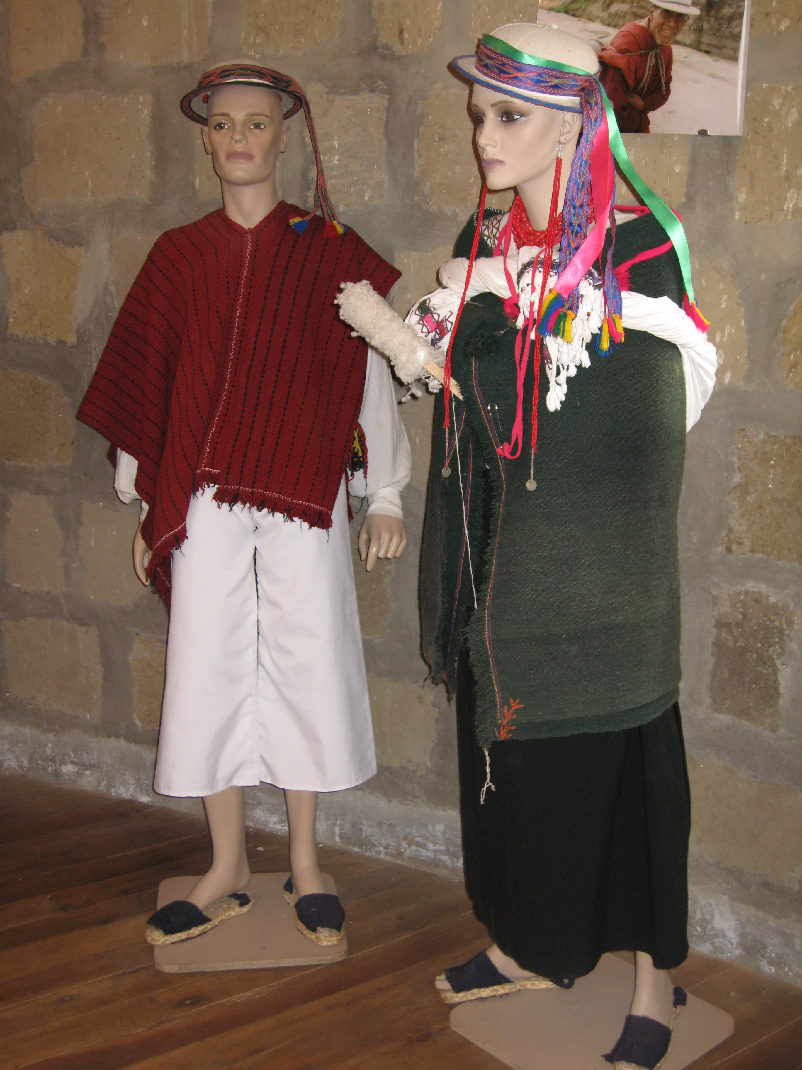 ropa autoctona de habitantes de Cacha